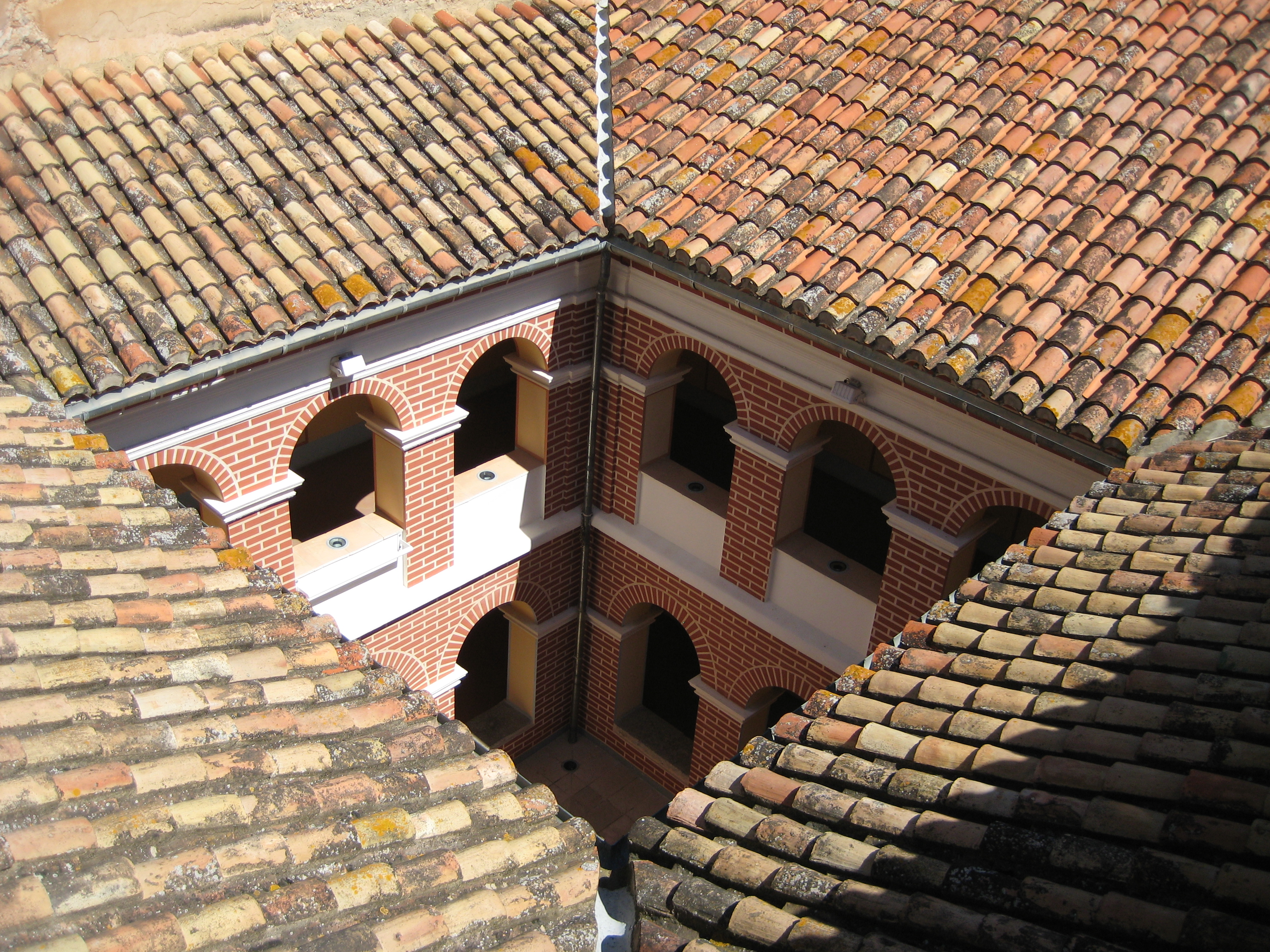 Claustre del Convent de Sant Francesc de Benicarló (Baix Maestrat)